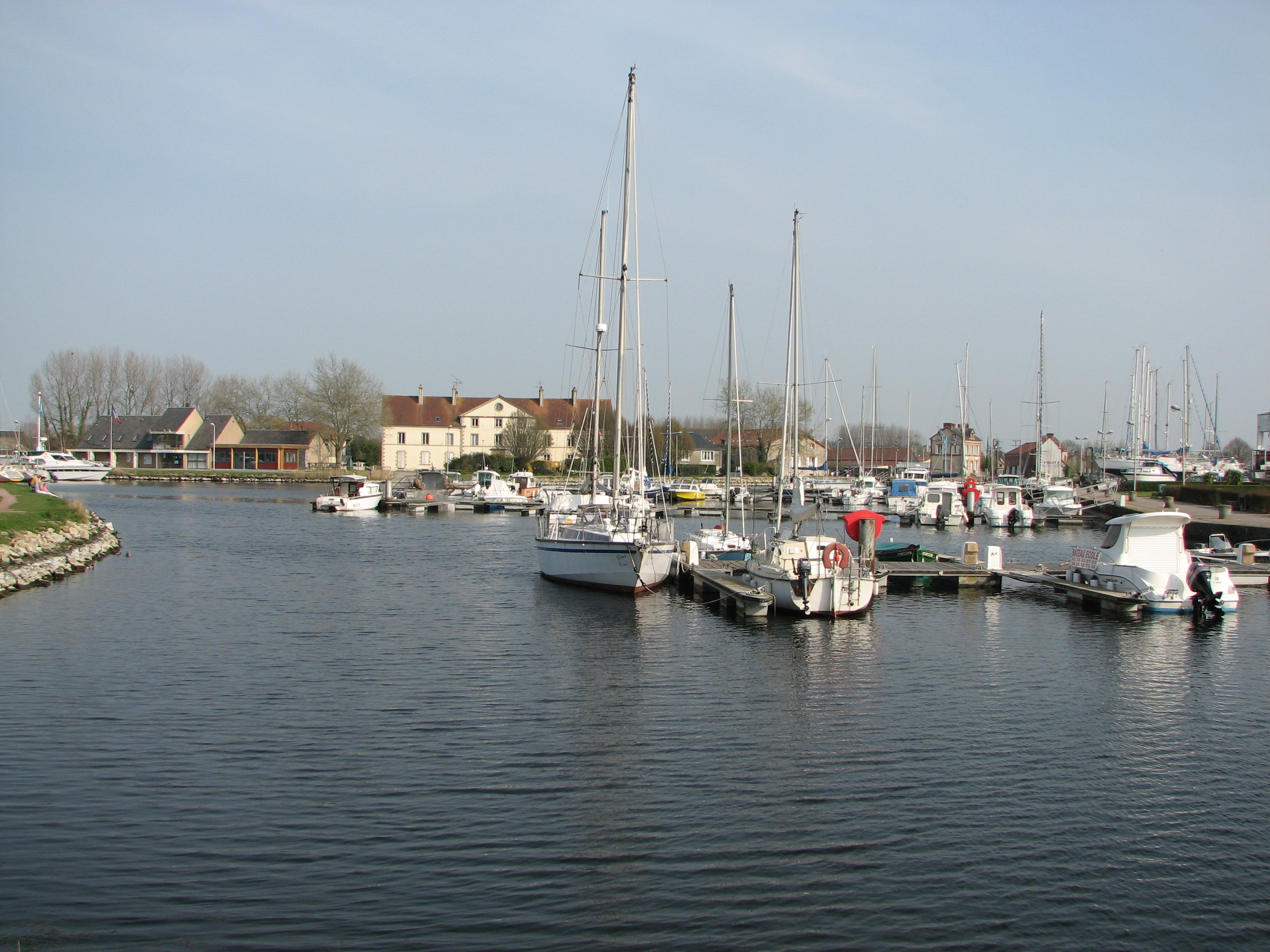 Port de plaisance de Carentan, Normandie Carentan Harbor, Normandy